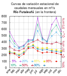 Curvas de variación estacional del río Futaleufú en la frontera. # Dirección General de Aguas # Santiago de Chile # Ministerio de Obras Públicas (Chile) # Análisis de metodología y determinación de cuadales de reserva turísticos # url: # CUADRO 6.3-10 CAUDALES MEDIOS MENSUALES EN ESTACIÓN FLUVIOMÉTRICA RÍO FUTALEUFÚ EN LA FRONTERA pág. 191 mes 5% 10% 20% 50% 85% 90% 95% ene 560.2 492.6 425.3 329.6 251.7 237.8 219.5 feb 416.7 374.4 333.2 276.4 232.8 225.4 216.0 mar 321.9 312.5 298.8 264.7 206.6 189.9 162.9 abr 351.3 341.8 328.7 298.2 249.4 235.8 214.3 may 438.1 422.7 404.1 369.0 326.8 317.0 302.5 jun 434.5 431.7 426.0 405.7 357.6 341.6 314.1 jul 772.5 675.3 576.8 433.5 313.4 291.5 262.6 ago 464.0 452.4 434.7 387.5 301.0 275.3 233.0 sep 409.7 407.8 402.5 378.1 309.3 284.9 241.9 oct 669.4 579.7 492.4 372.3 278.7 262.4 241.3 nov 776.0 664.0 553.5 398.4 275.0 253.3 225.0 dic 564.9 522.2 470.3 372.9 263.4 240.0 207.4